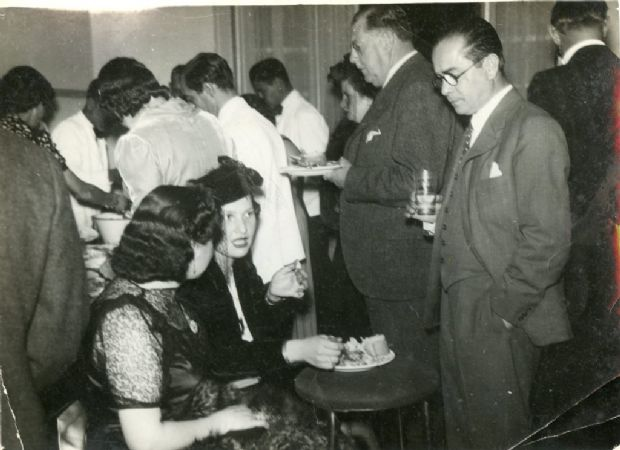 En una reunión en el Hotel Savoy se observa a Percy Hill (de pie atrás), al doctor Edmundo Mena (de pie adelante) y a María Eloísa Martínez Castro de Mena en animada conversación